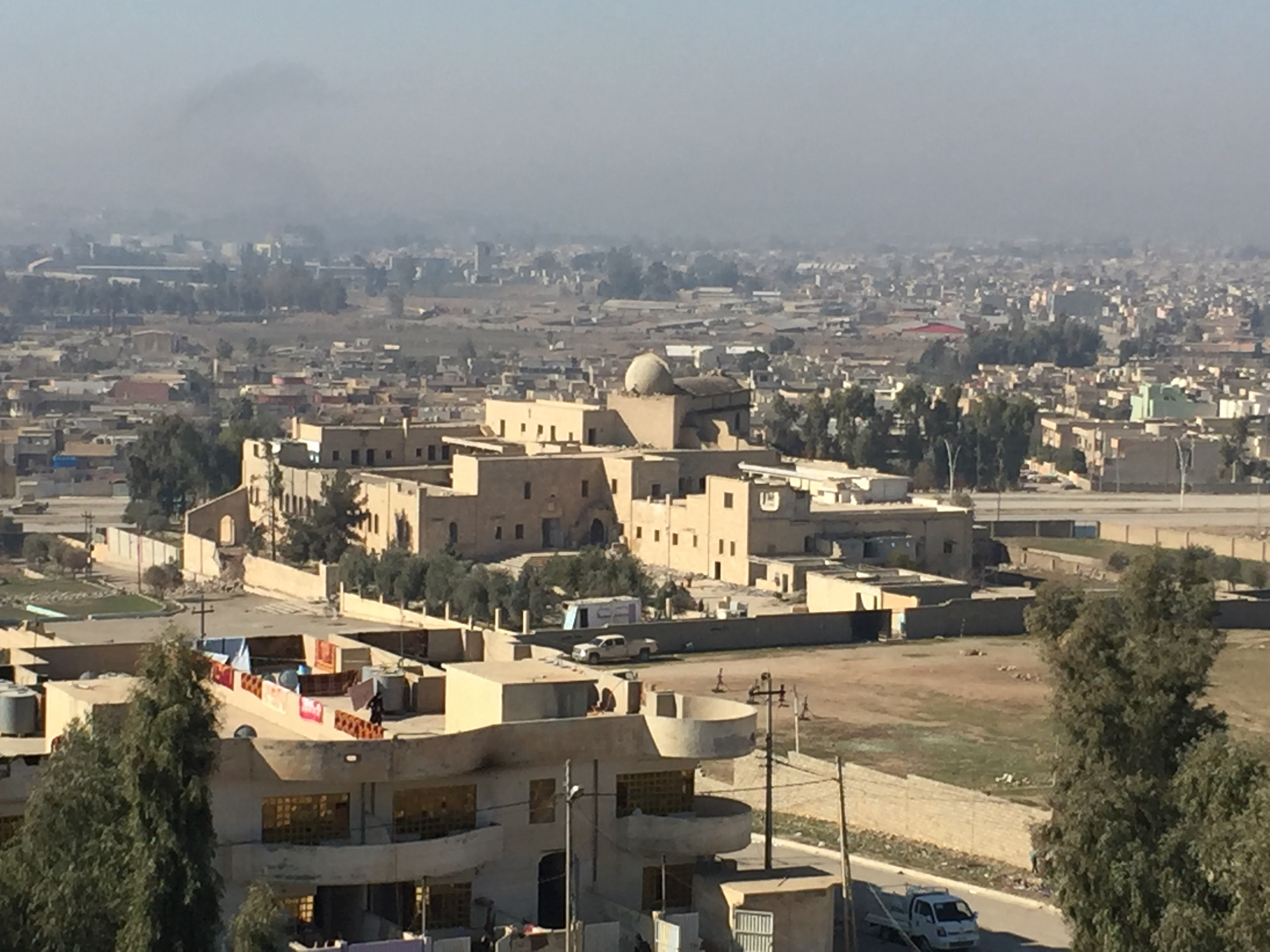 دير مار كوركيس كما تم تصويره من فوق تل الصليب في حي العربي (فيصل جبر)